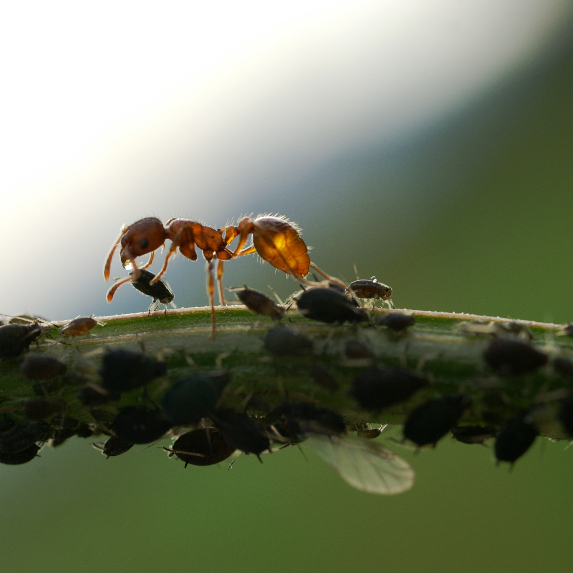 melkende Ameise Honigtau